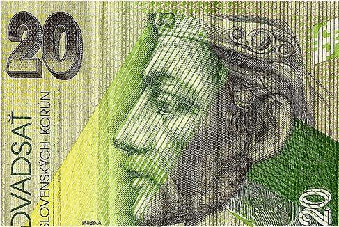 Knieža pribina na slovenskej 20Sk